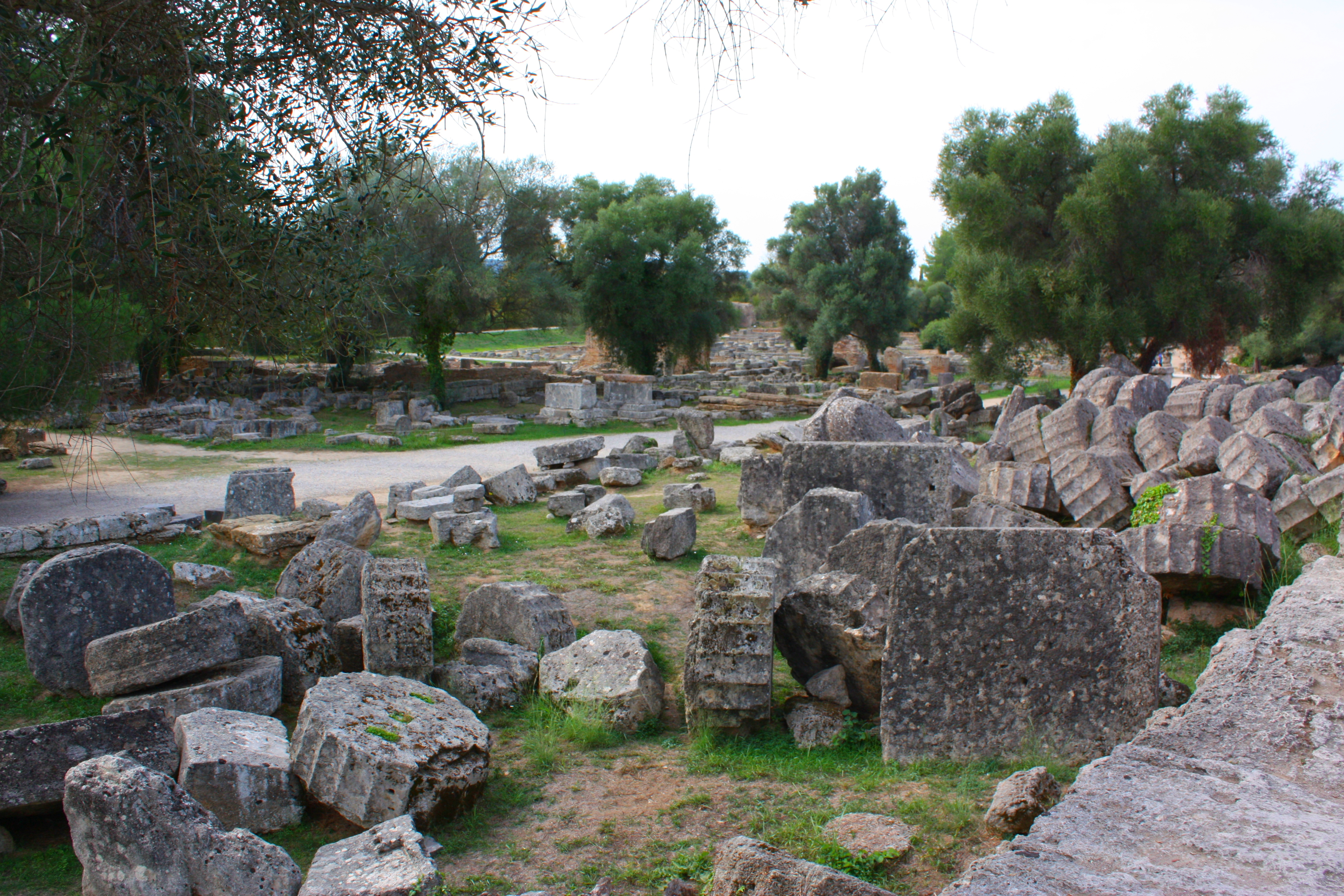 Olümpia romjai 03